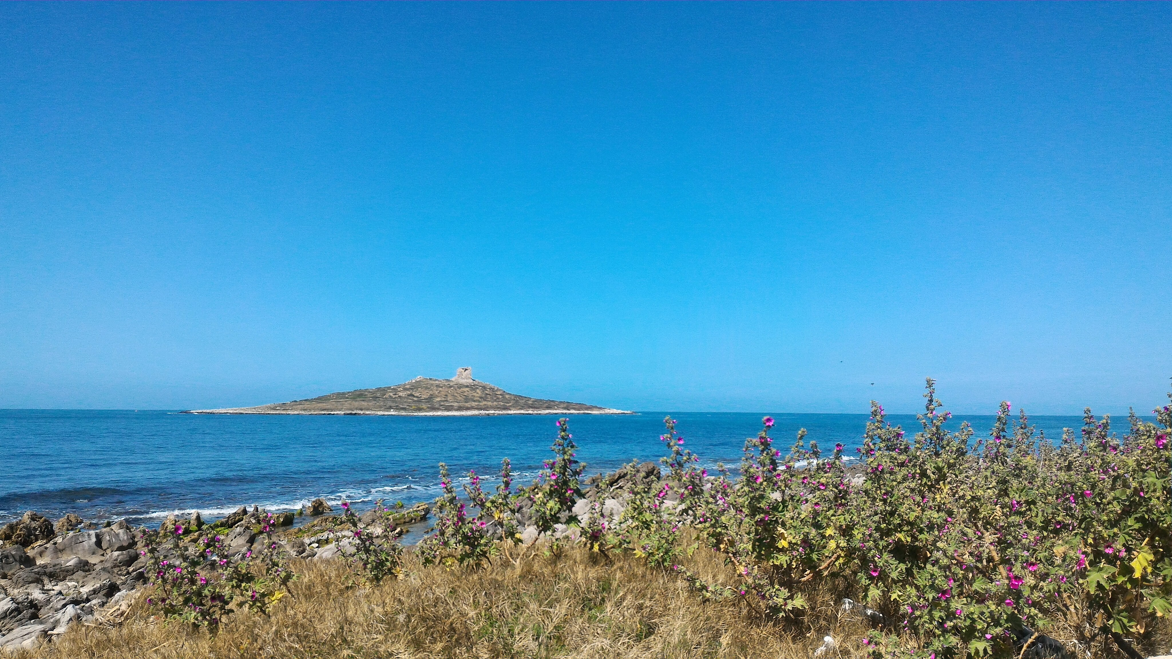 area naturale marina protetta Capo Gallo - Isola delle Femmine (Q3622034)